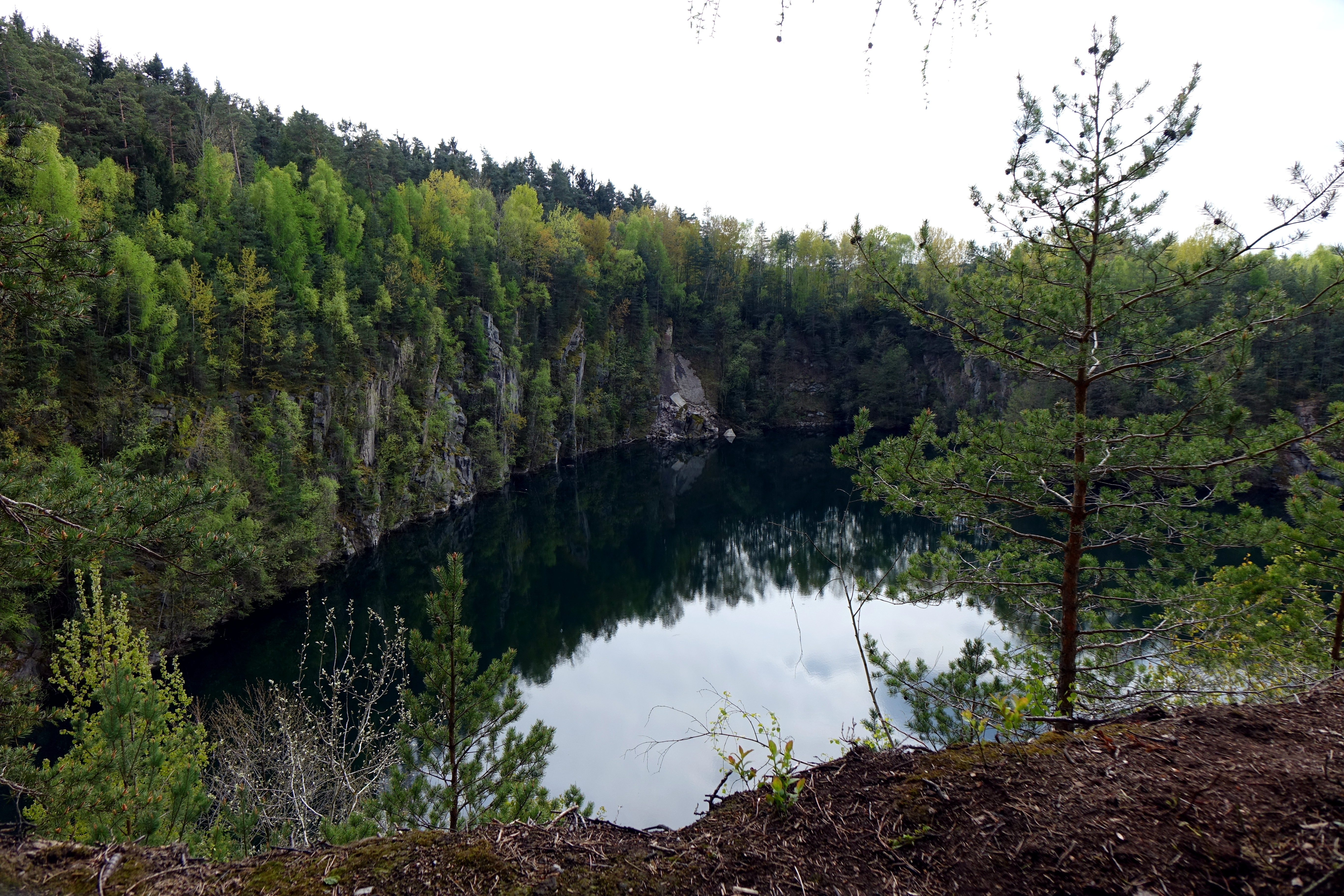 Steinbruchsee Gumping, NE von Gumping, zwischen Nittenau und Wald Oberpfalz Schutzgebiet: 372A078